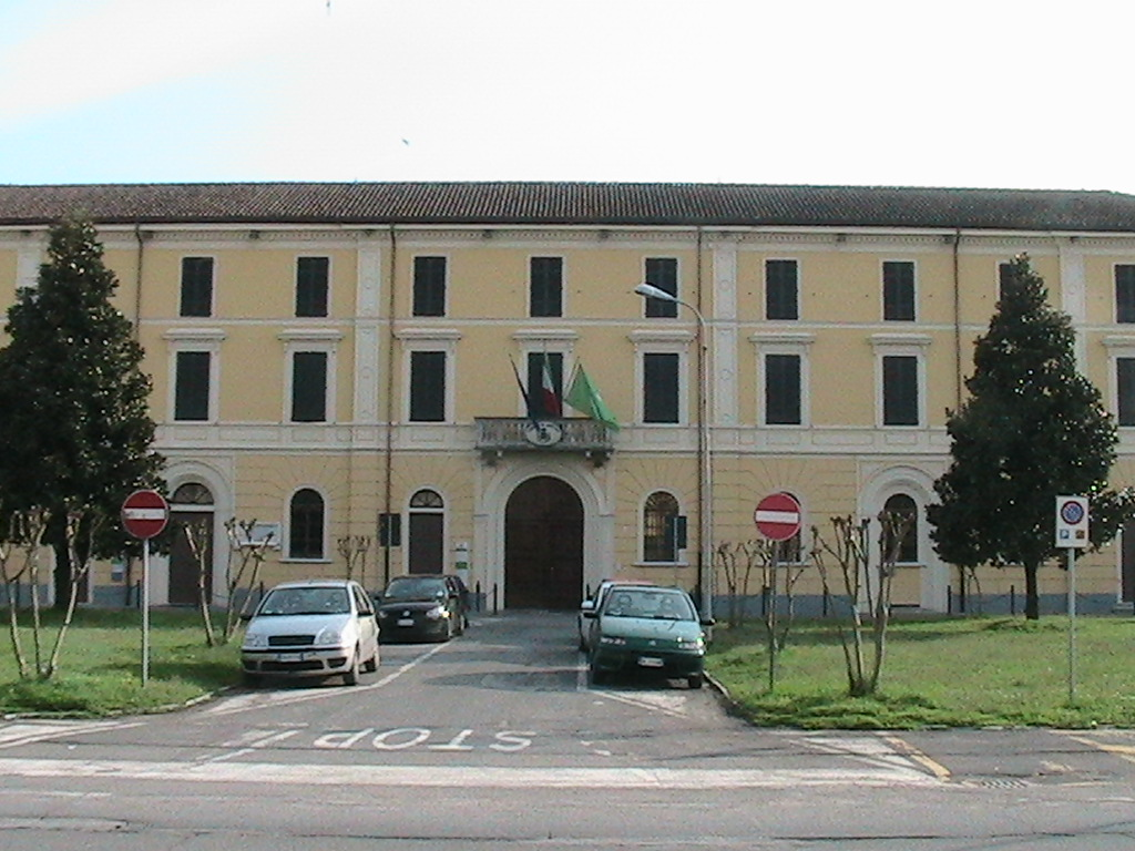 Sospiro - Municipio